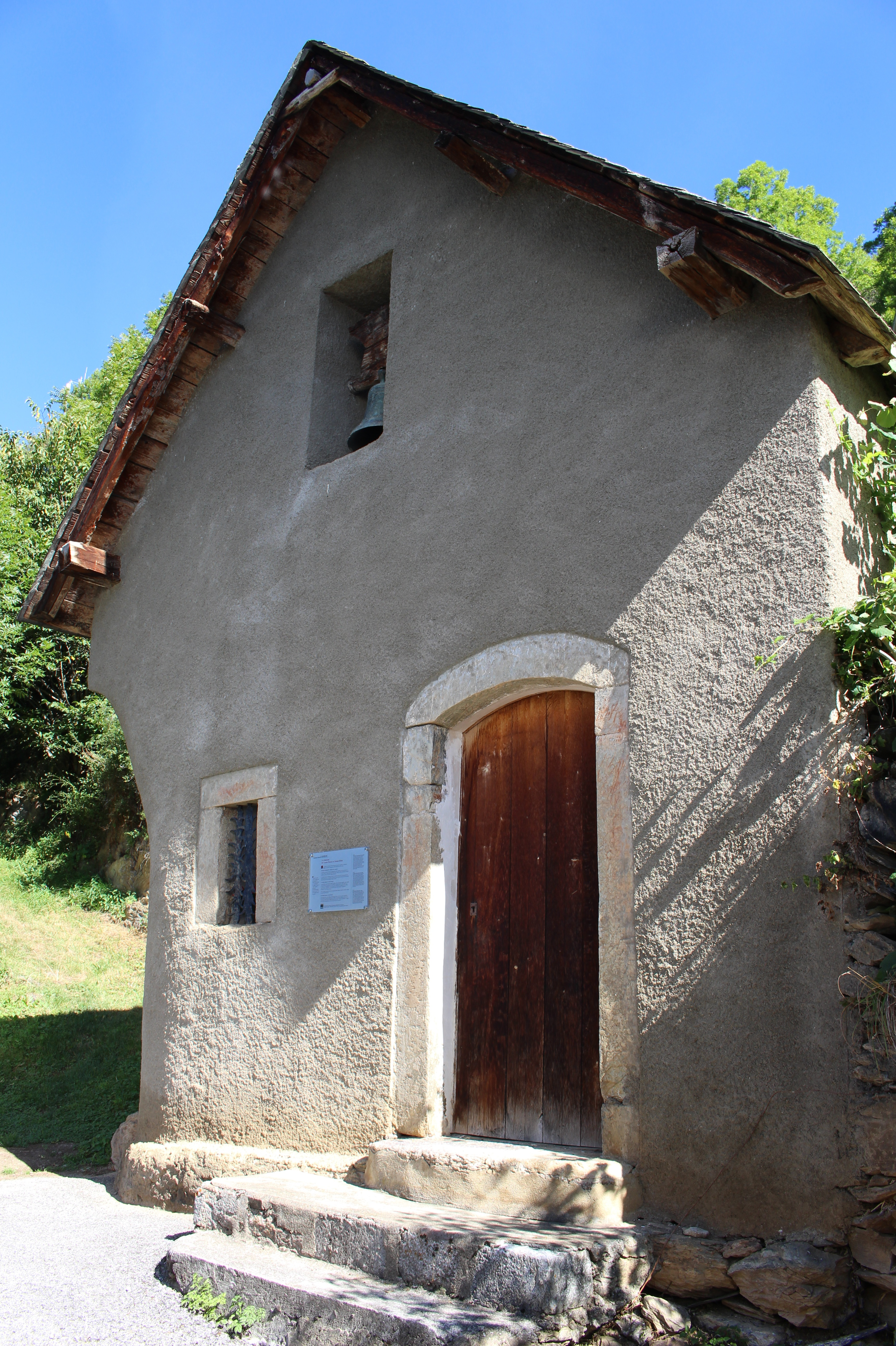 Chapelle Saint-Éloi de Cazaux-Dessus (Hautes-Pyrénées)